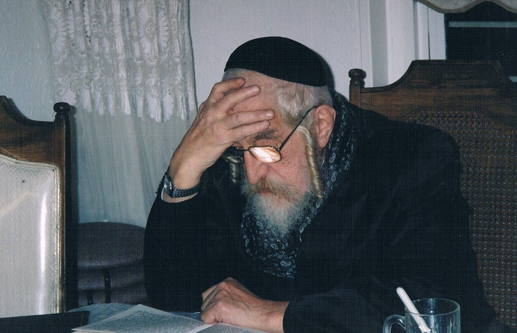 ראש הישיבה הרה"ג ר אפרים פישל רבינוביץ בעת הלימוד